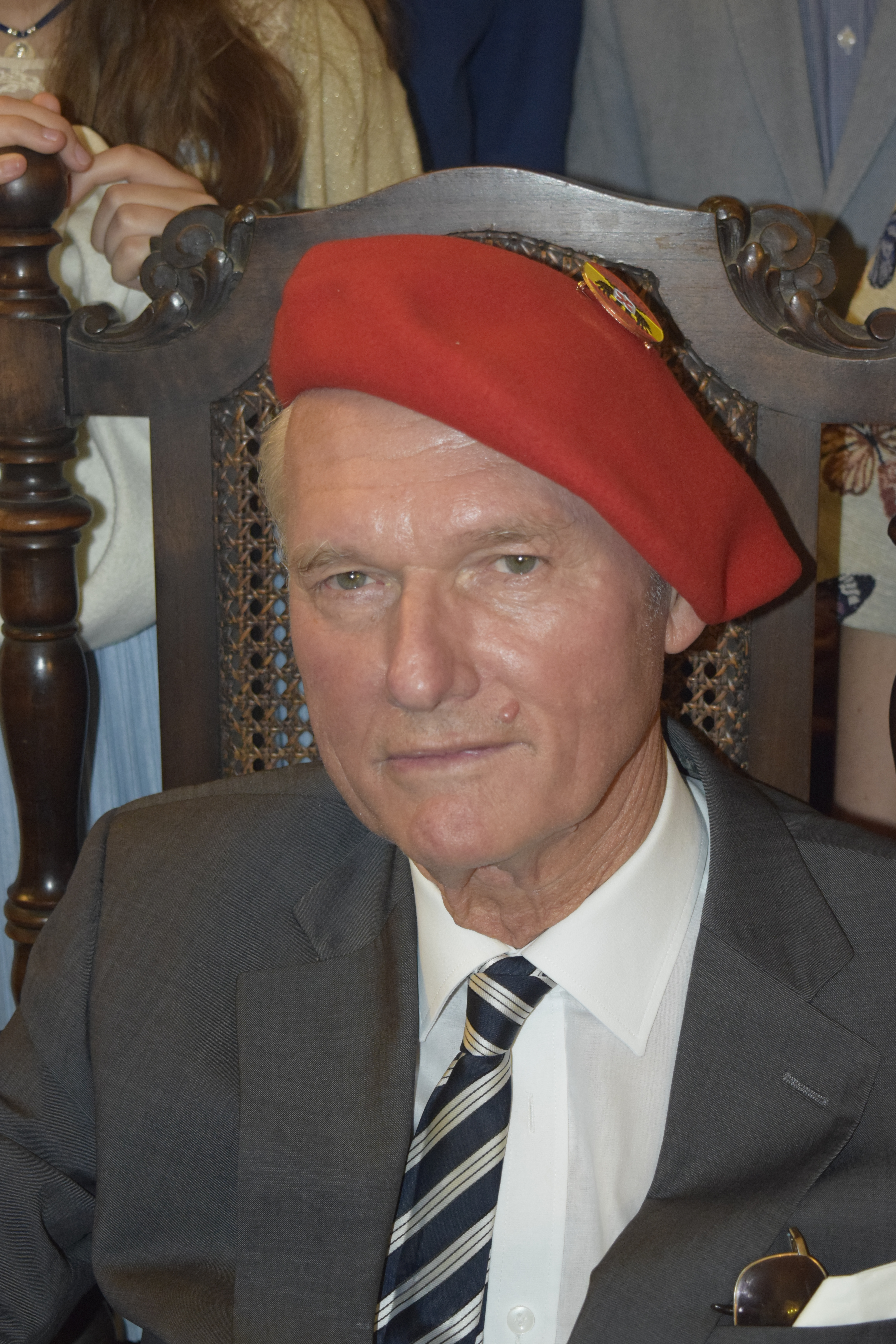 S.A.R. D. Sixto Enrique de Borbón preside el XL Aniversario del fallecimiento de su Augusto padre, S.M.C. D. Javier I, en el Real Monasterio de El Puig de Santa María.